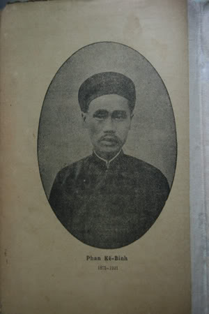 Chân dung nhà văn, nhà thơ, dịch giả Phan Kế Bính